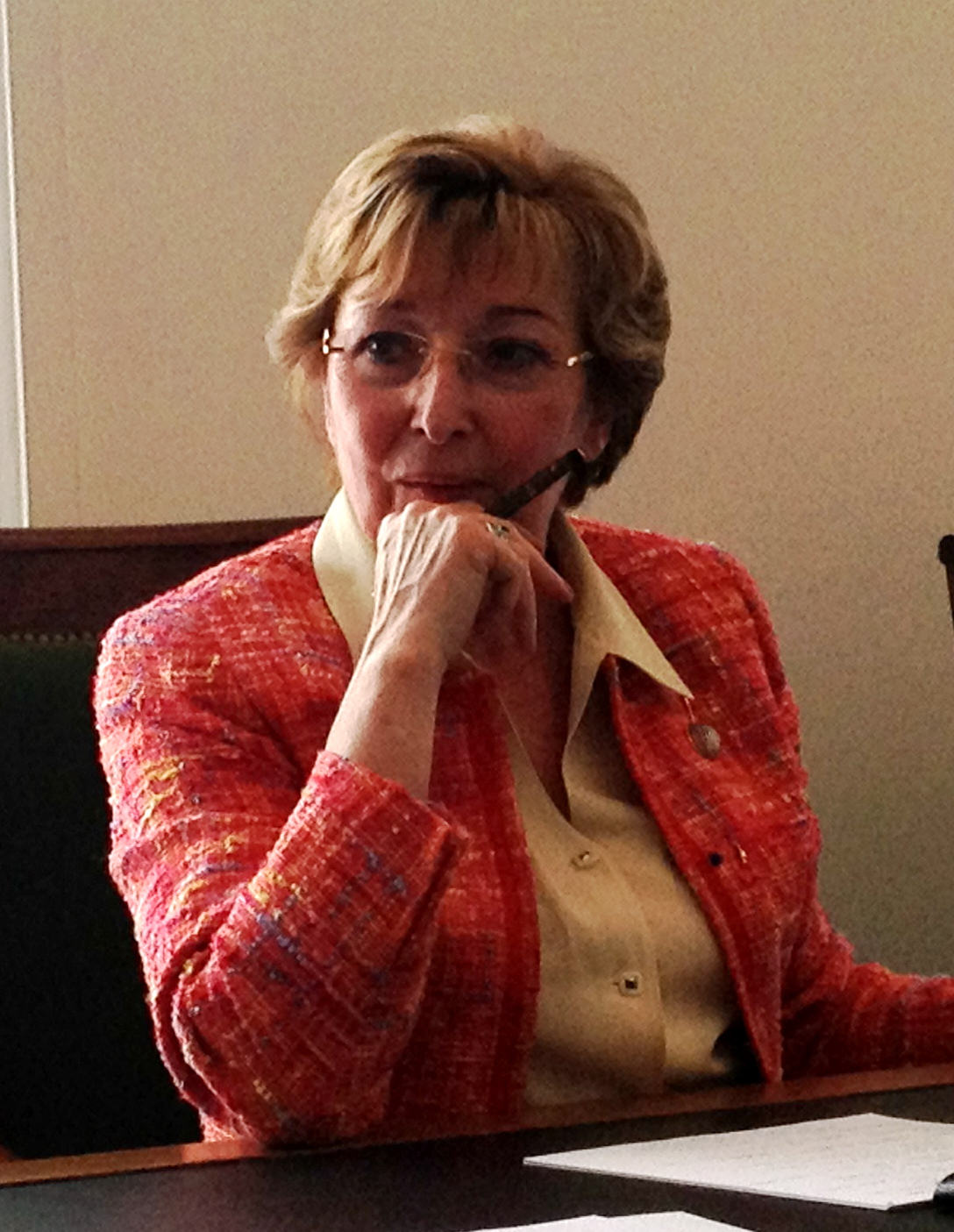 Anne-Marie Escoffier (PRG), Ministre déléguée à la Décentralisation, le 2 juillet 2013 à l'Assemblée nationale.